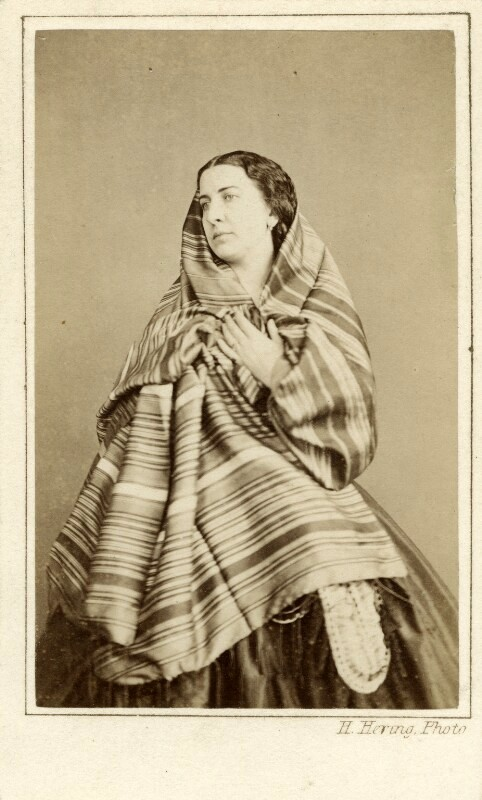 Photograph by Henry Hering